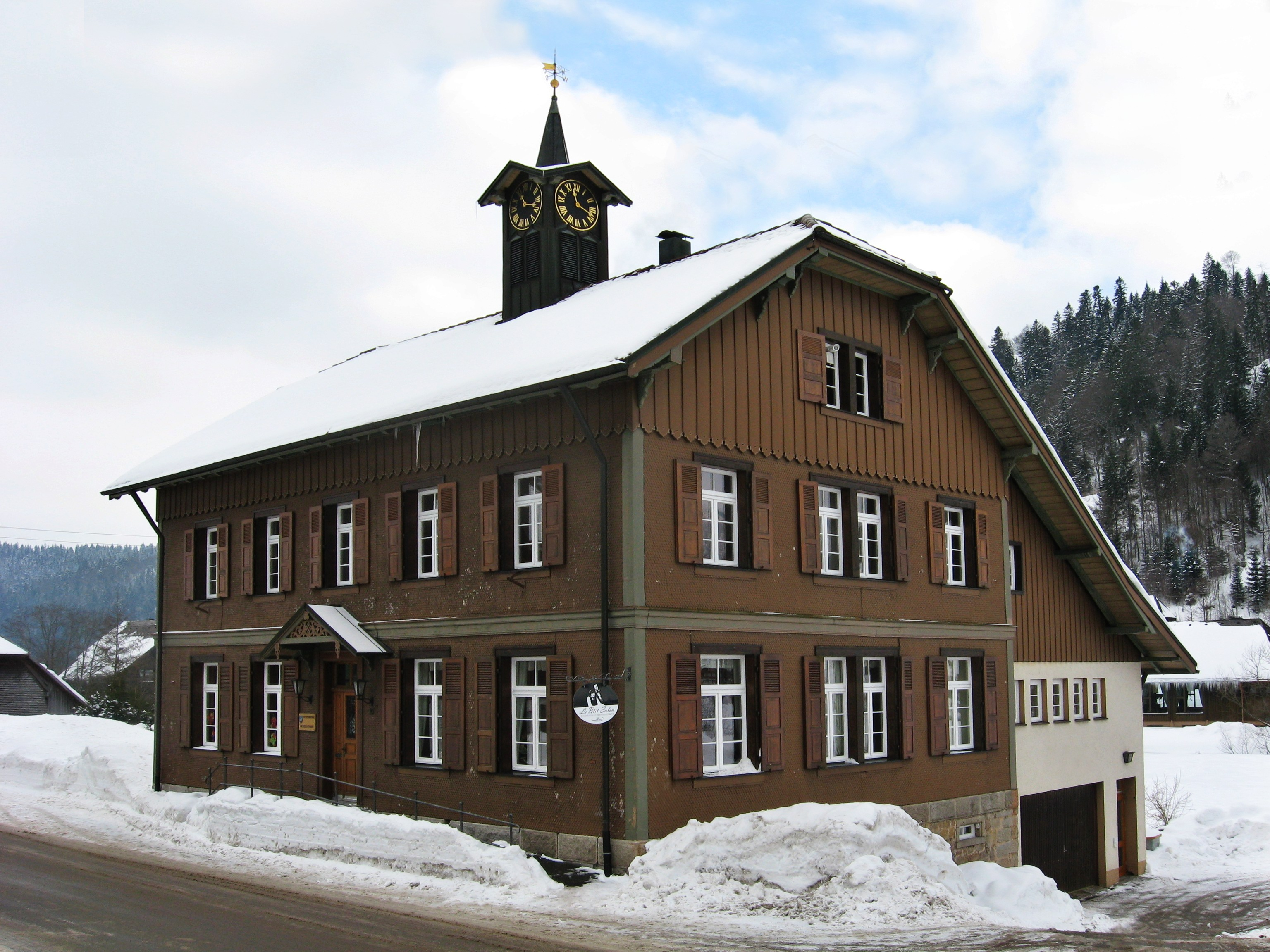 Museum Le Petit Salon zum Gedenken an die Brüder Winterhalter in Menzenschwand